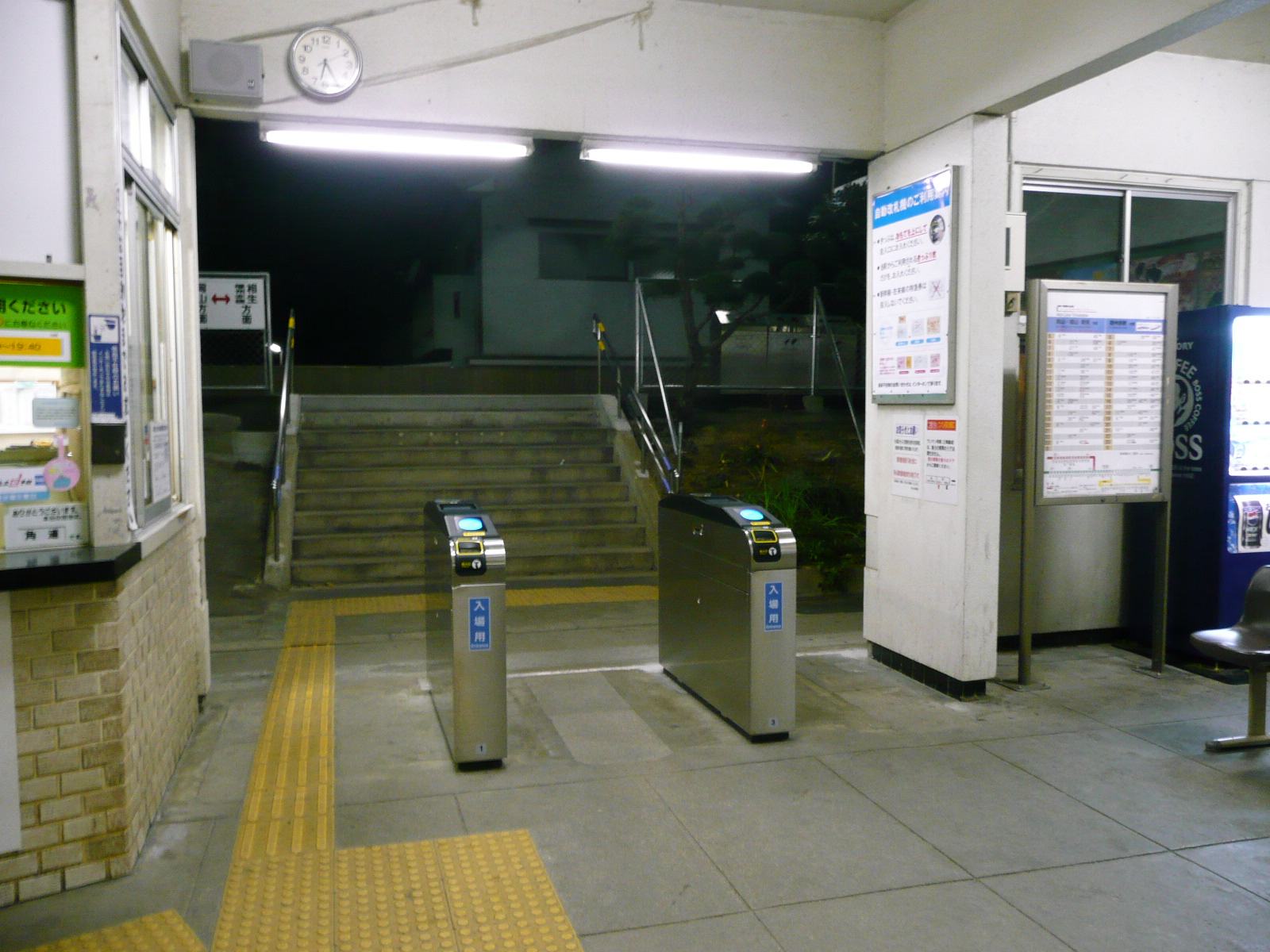 邑久駅改札